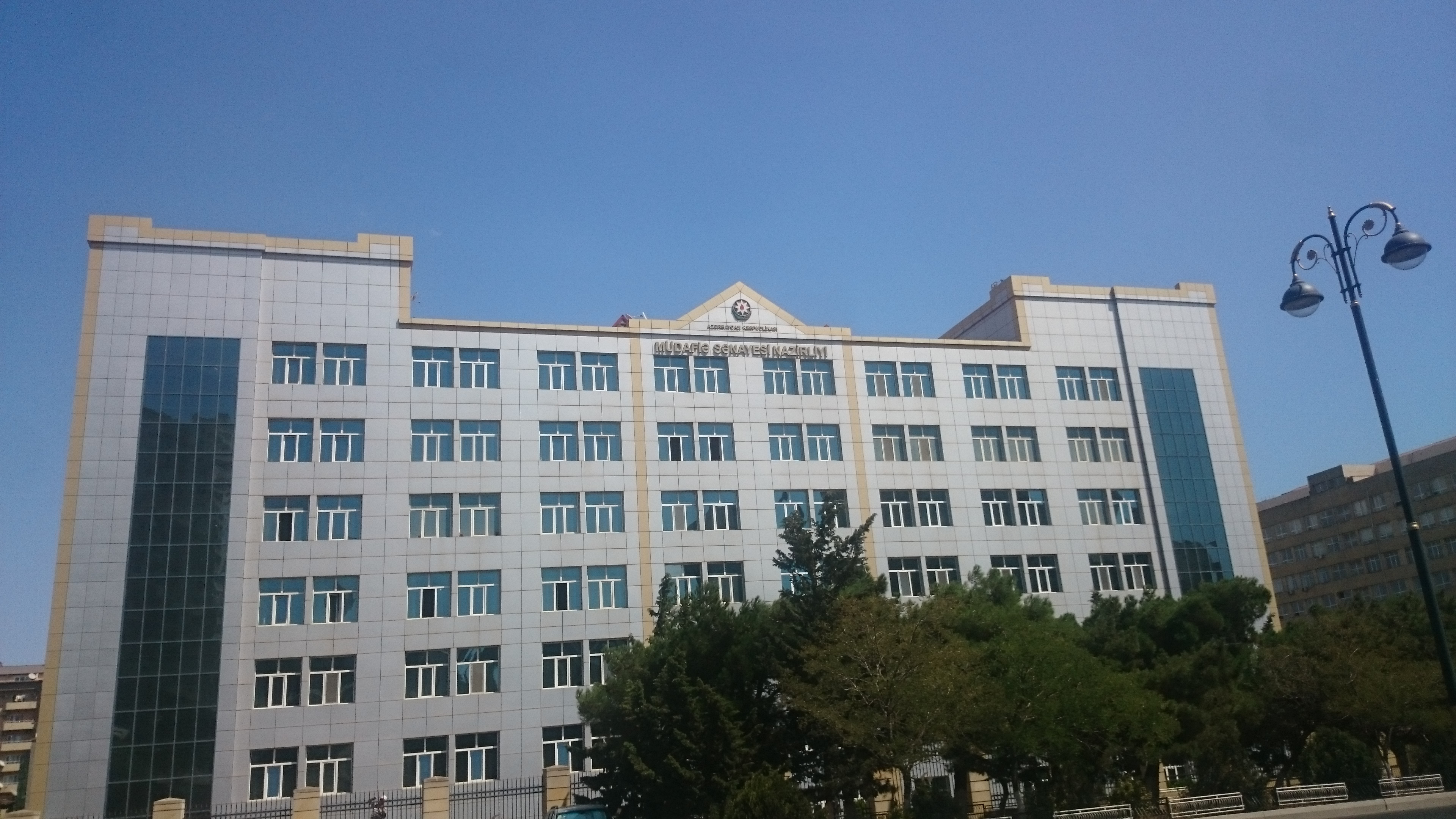 Müdafiə_Sənayesi_Nazirliyi_inzibati_bina